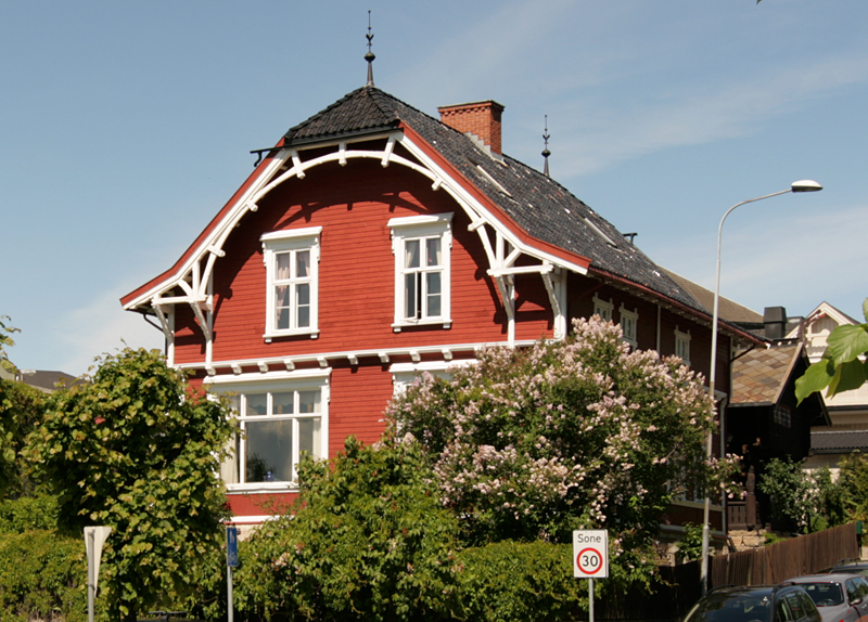 Engebret Soots villa, Stangevegen 14, Hamar. Bygd 1896. Arkitekt: Engebret Soot.